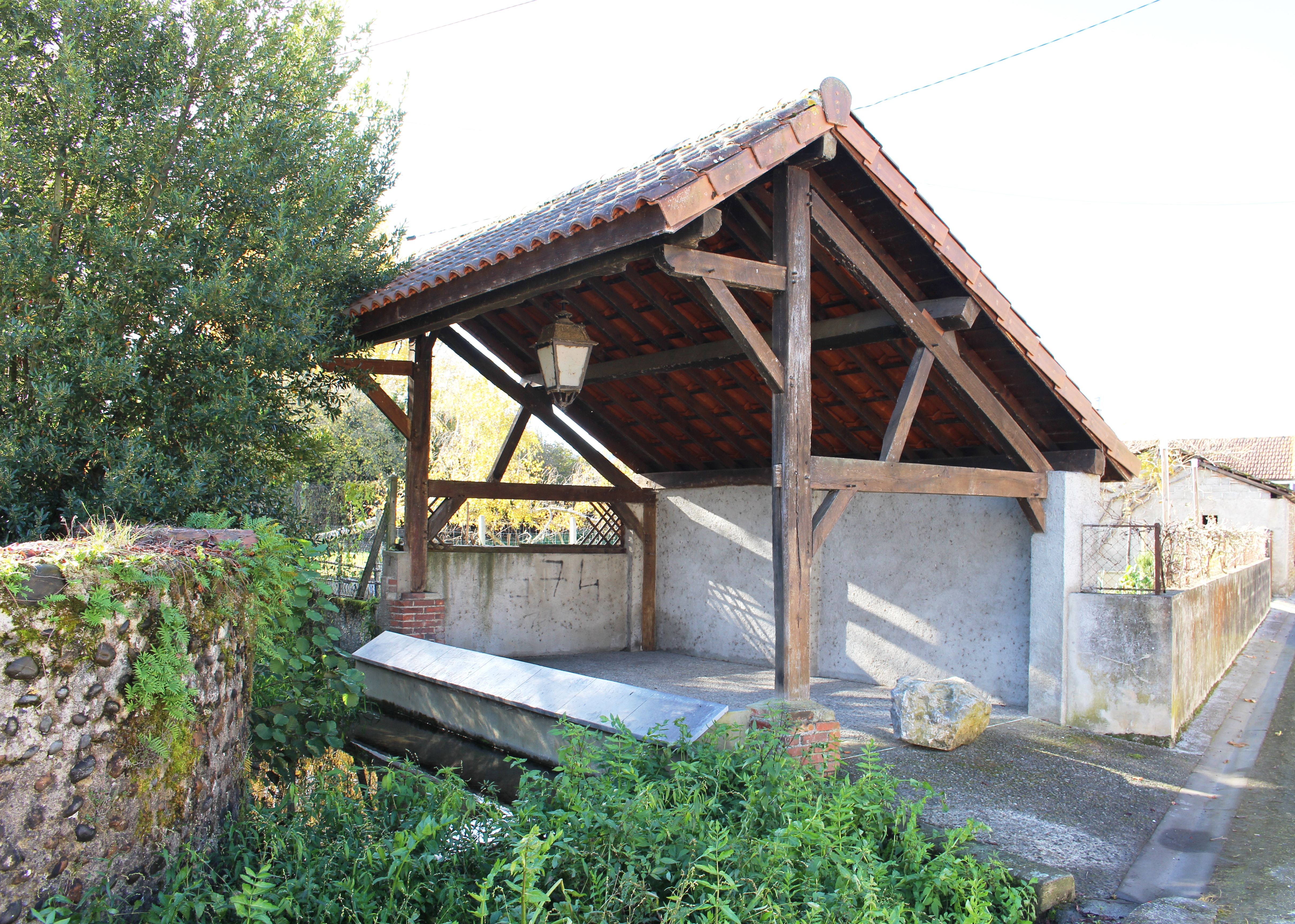 Lavoir de Caixon (Hautes-Pyrénées)